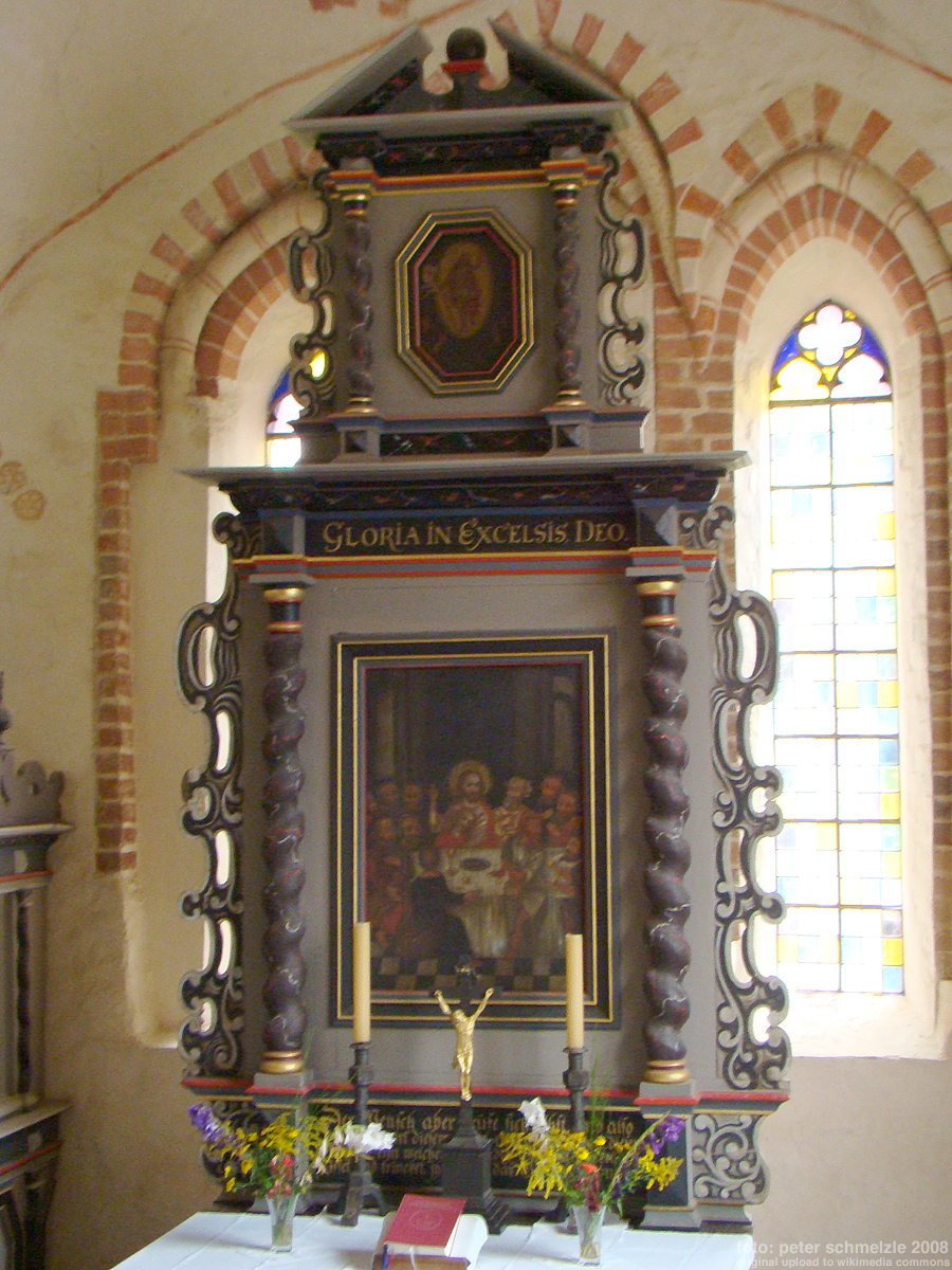 Dorfkirche Groß Gievitz, Altaraufbau